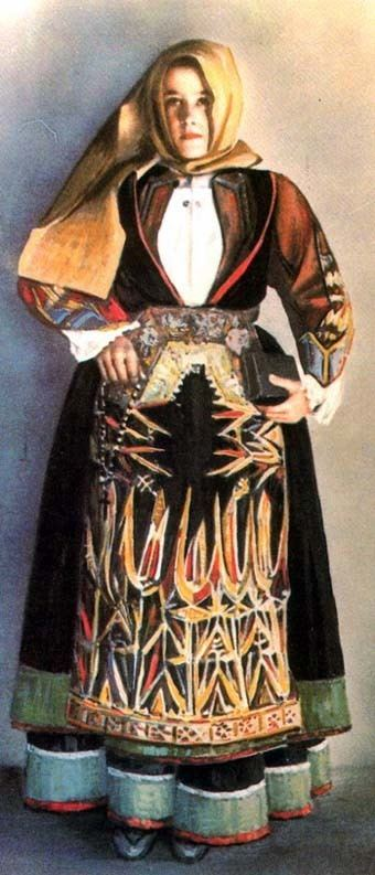 Beata Antonia Mesina